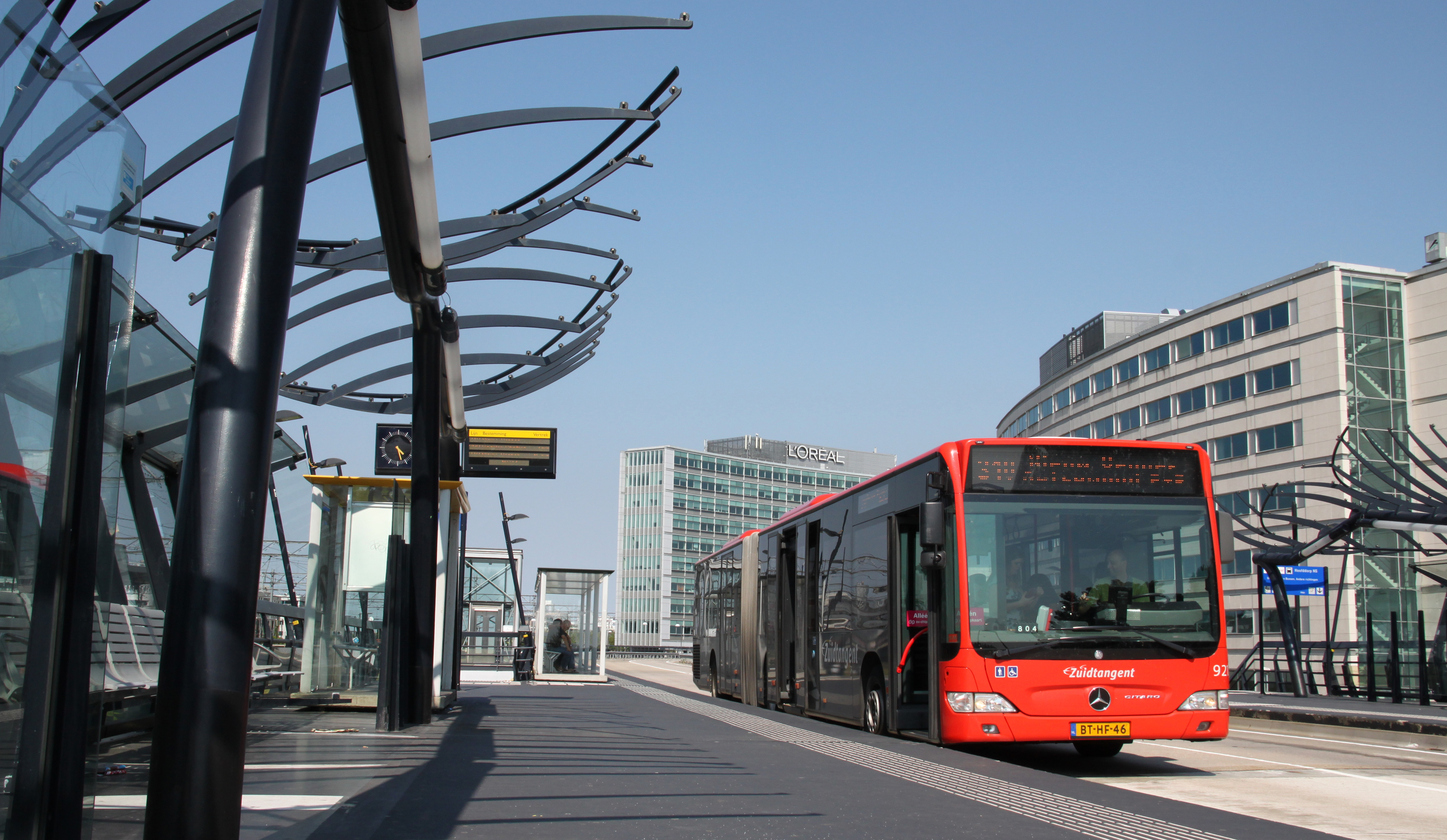 Mercedes-Benz CitaroG als een Zuidtangent-bus te Hoofddorp, Station NS. De bus rijdt als lijn 310 richting Nieuw-Vennep.